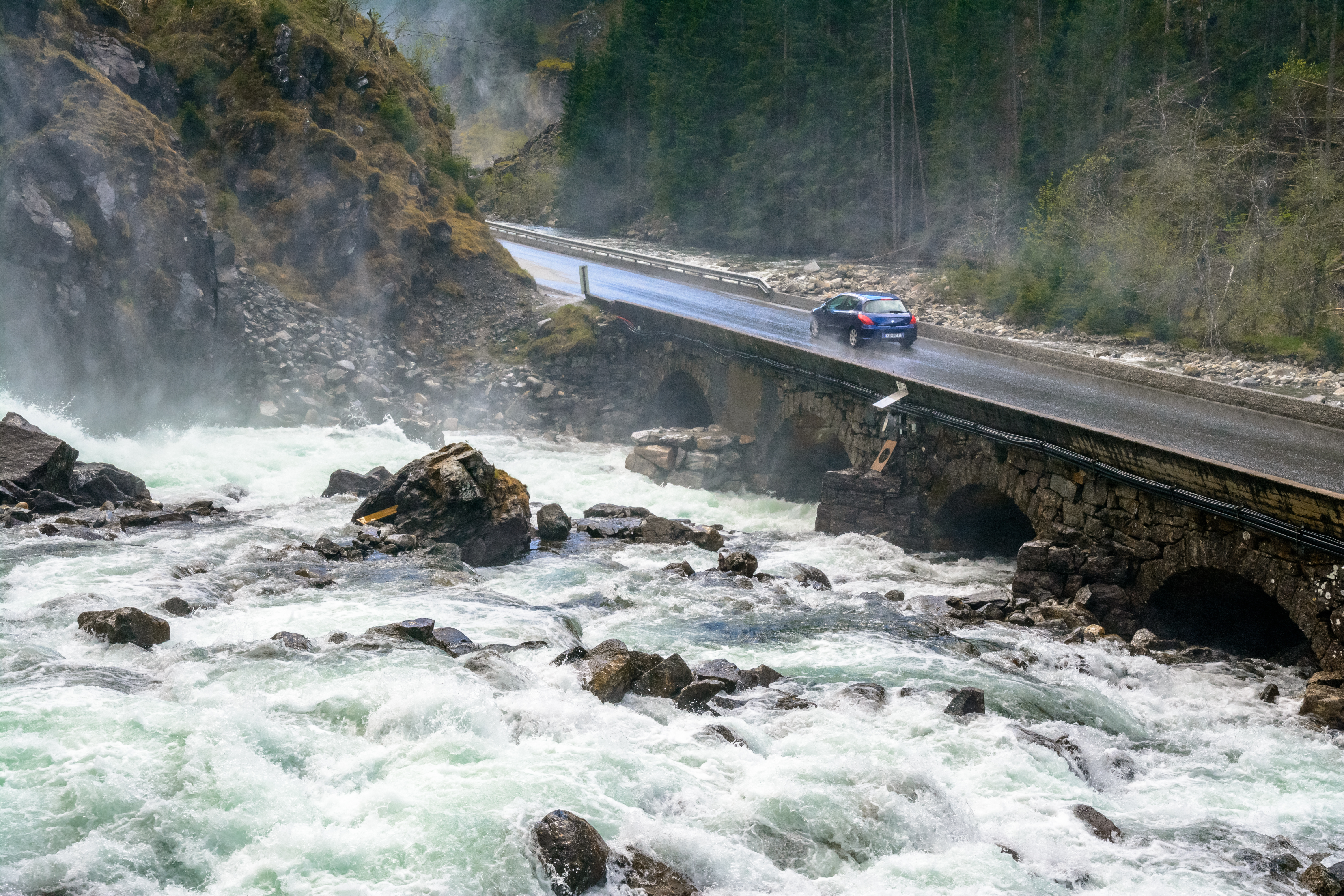 Låtefossen, Norway